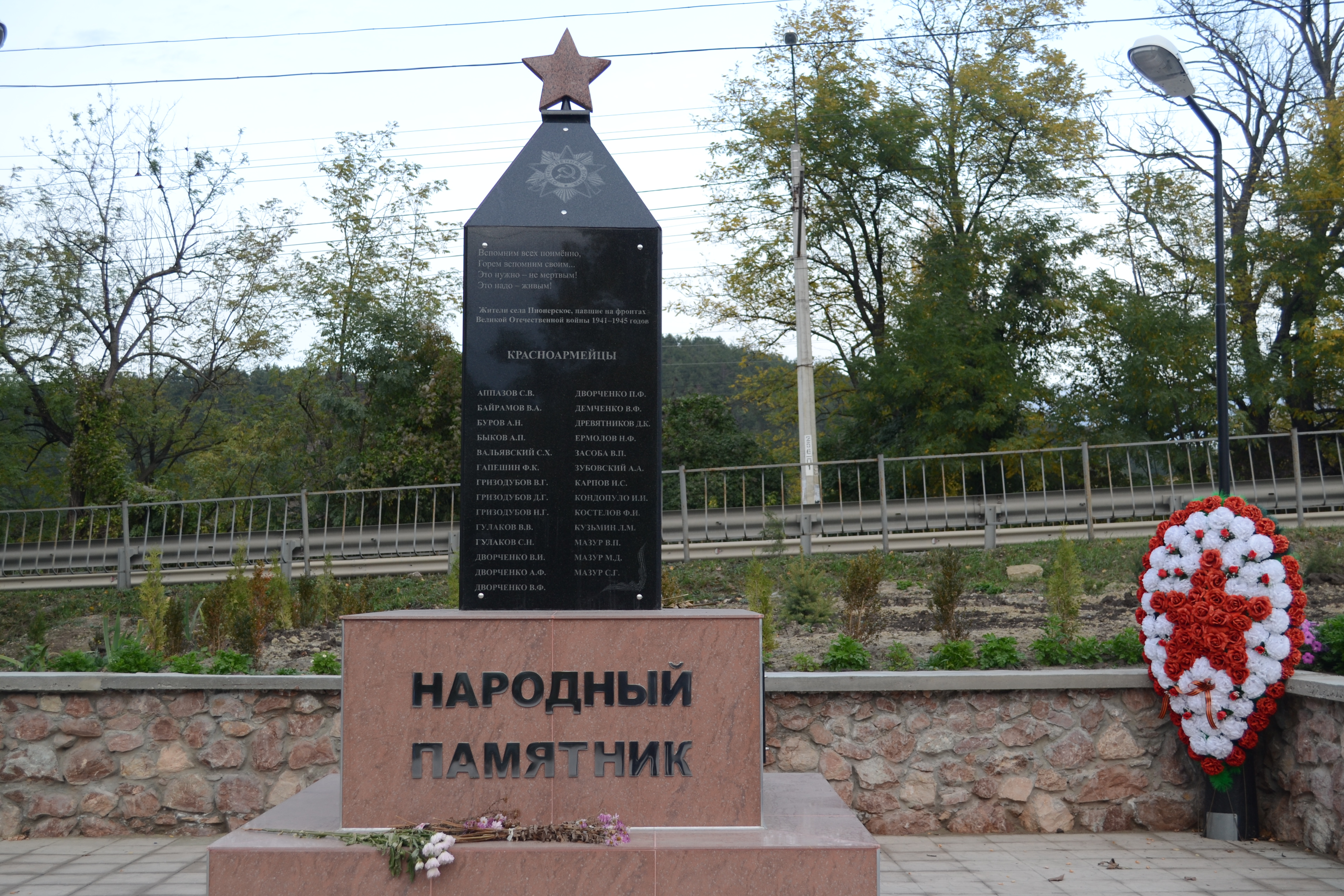 Жители села Пионерское, павшие на фронтах ВОВ